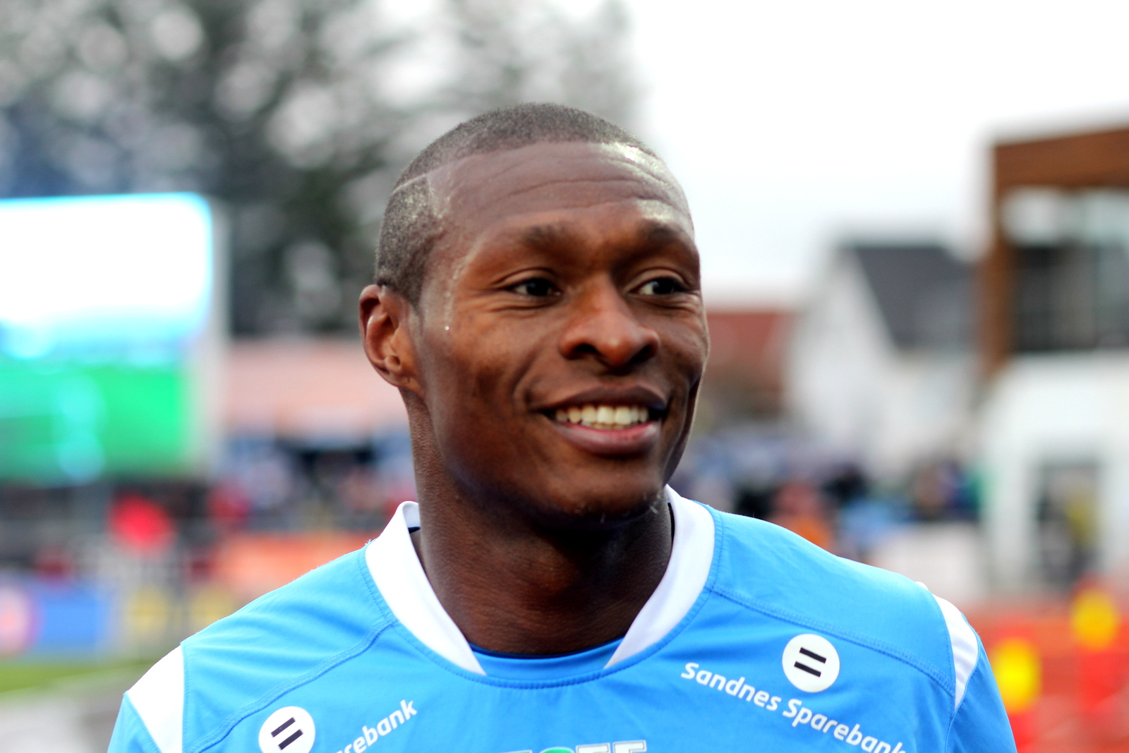 Edier Frejd på Sandnes Stadion i kampen mellom Sandnes ULF mot Molde